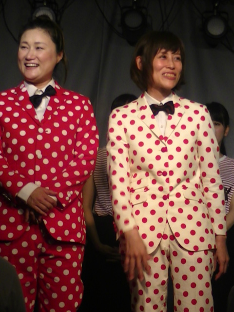 マリア (お笑いコンビ) 2018年9月